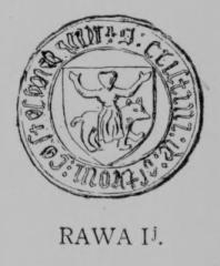 Rawicz Ij